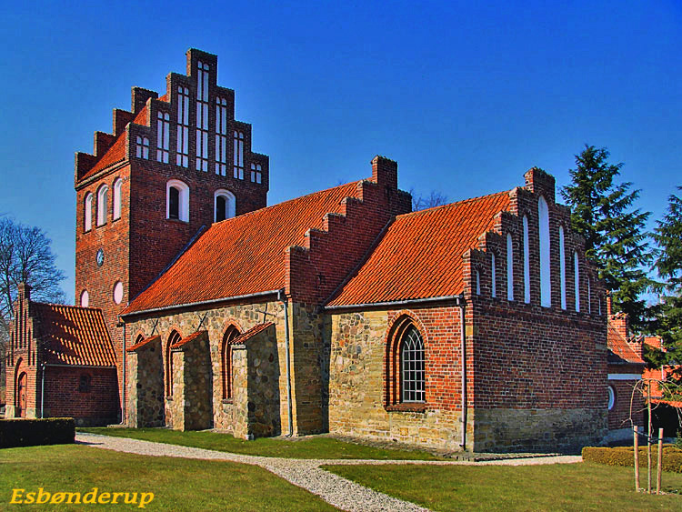 fra sydøst